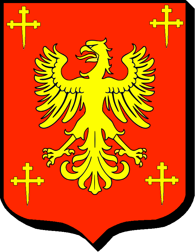 De gueules, à l'aigle éployée d'or, accompagnée de quatre croix recroisettées de même au pied fiché, deux en chef et deux en pointe.